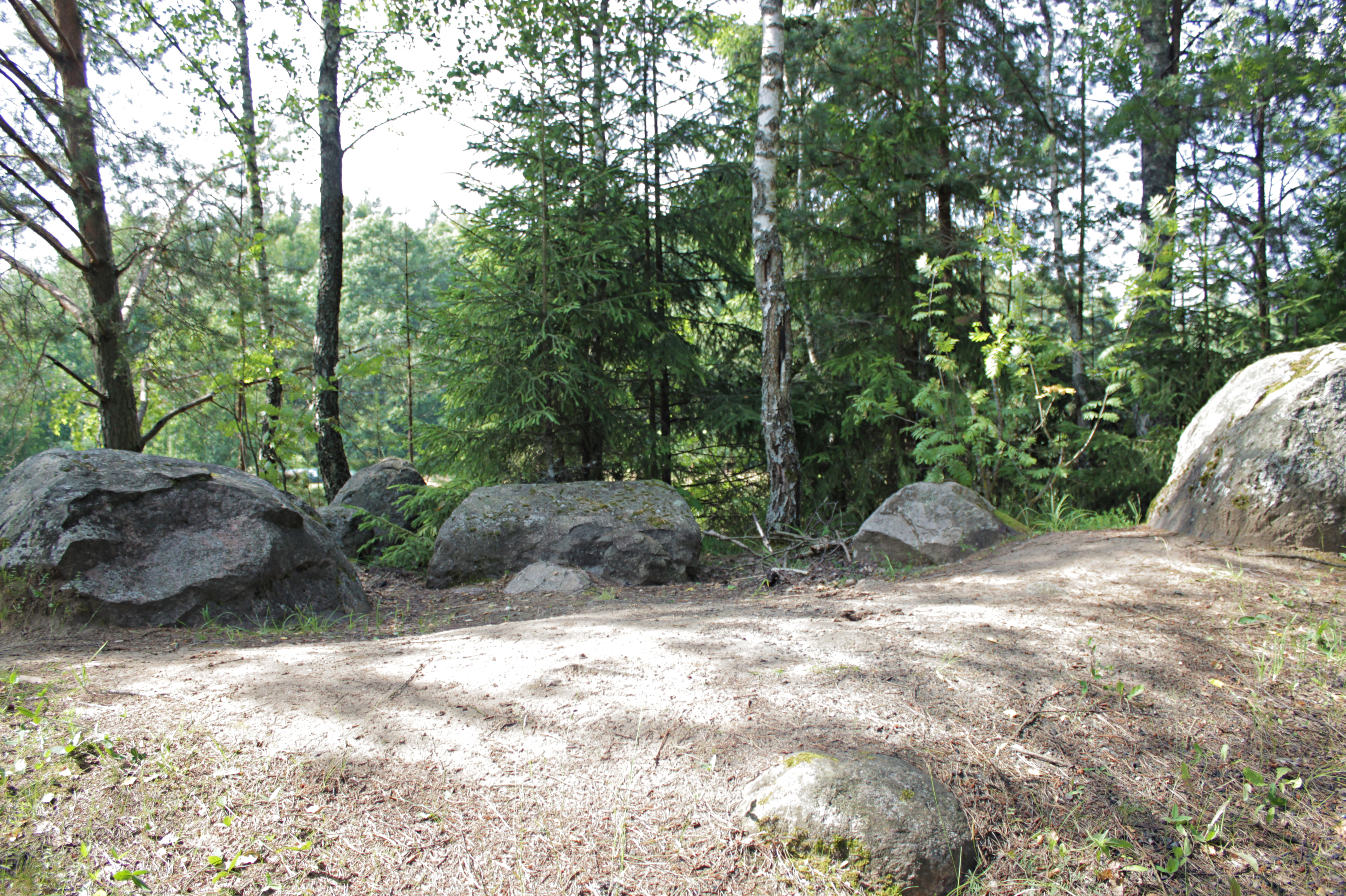 Aikštelė ant akmenų kalnelio